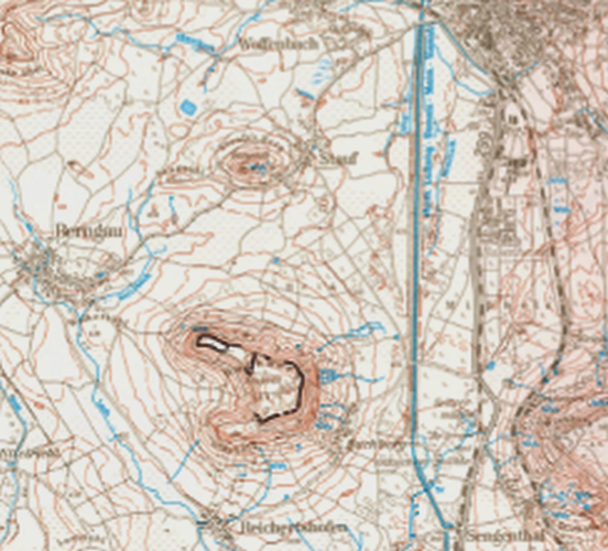 Topographische Aufnahme des Ringwalls Buchberg